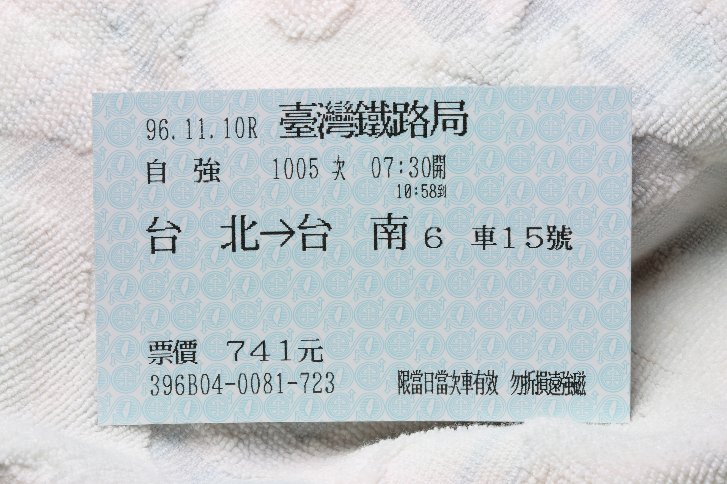 臺灣鐵路管理局第1005車次自強號背磁式車票，從臺北站到臺南站，乘車日期為2007年（中華民國96年）11月10日。